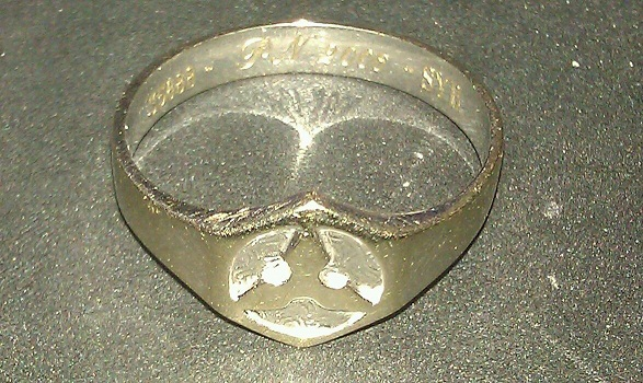 Siro valkokultainen insinöörisormus